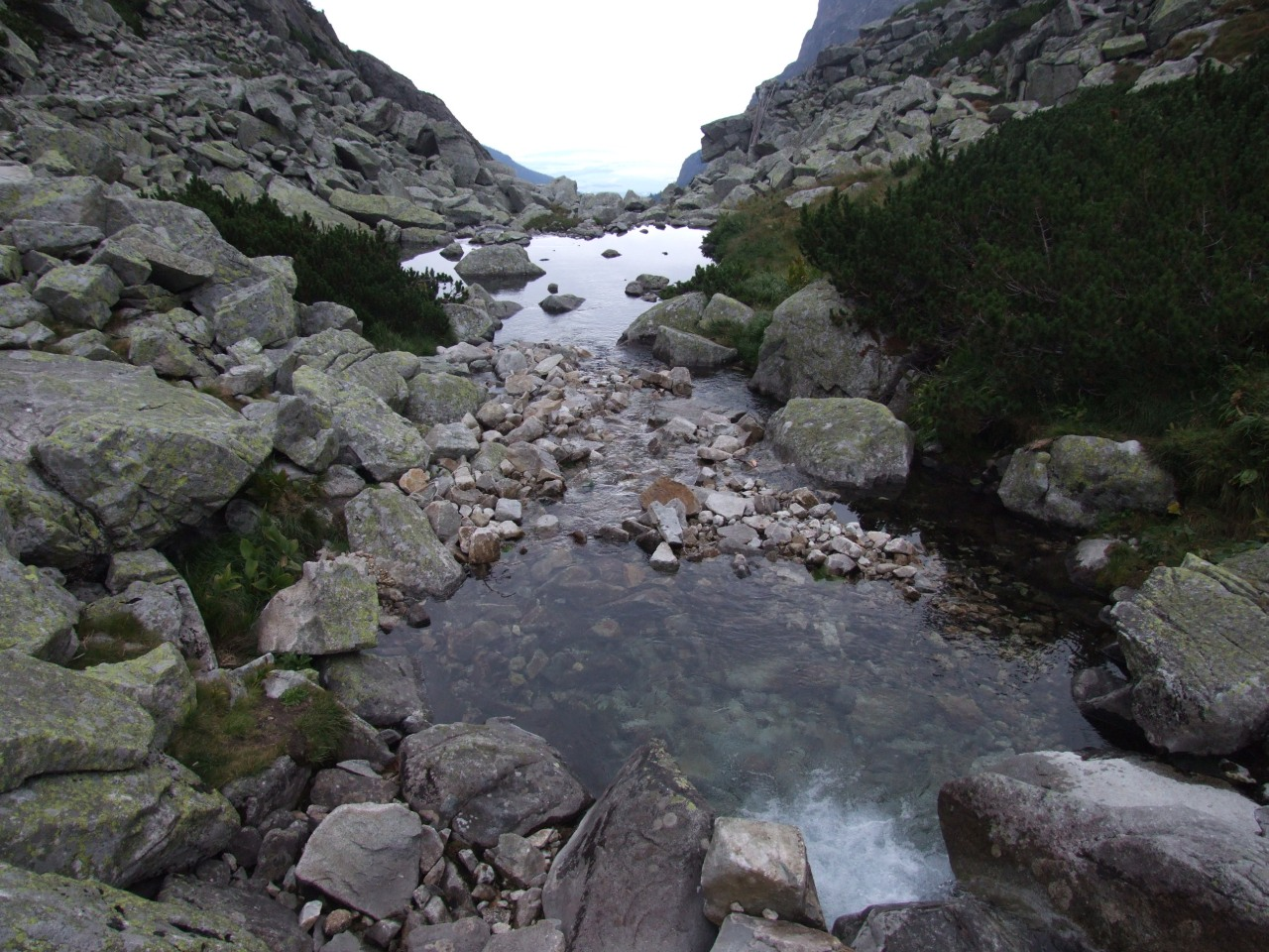 Staroleśny Potok poniżej Warzęchowego Stawu